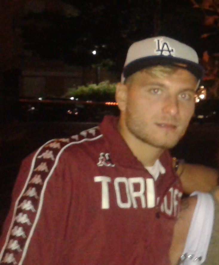 ciro immobile a mondovì